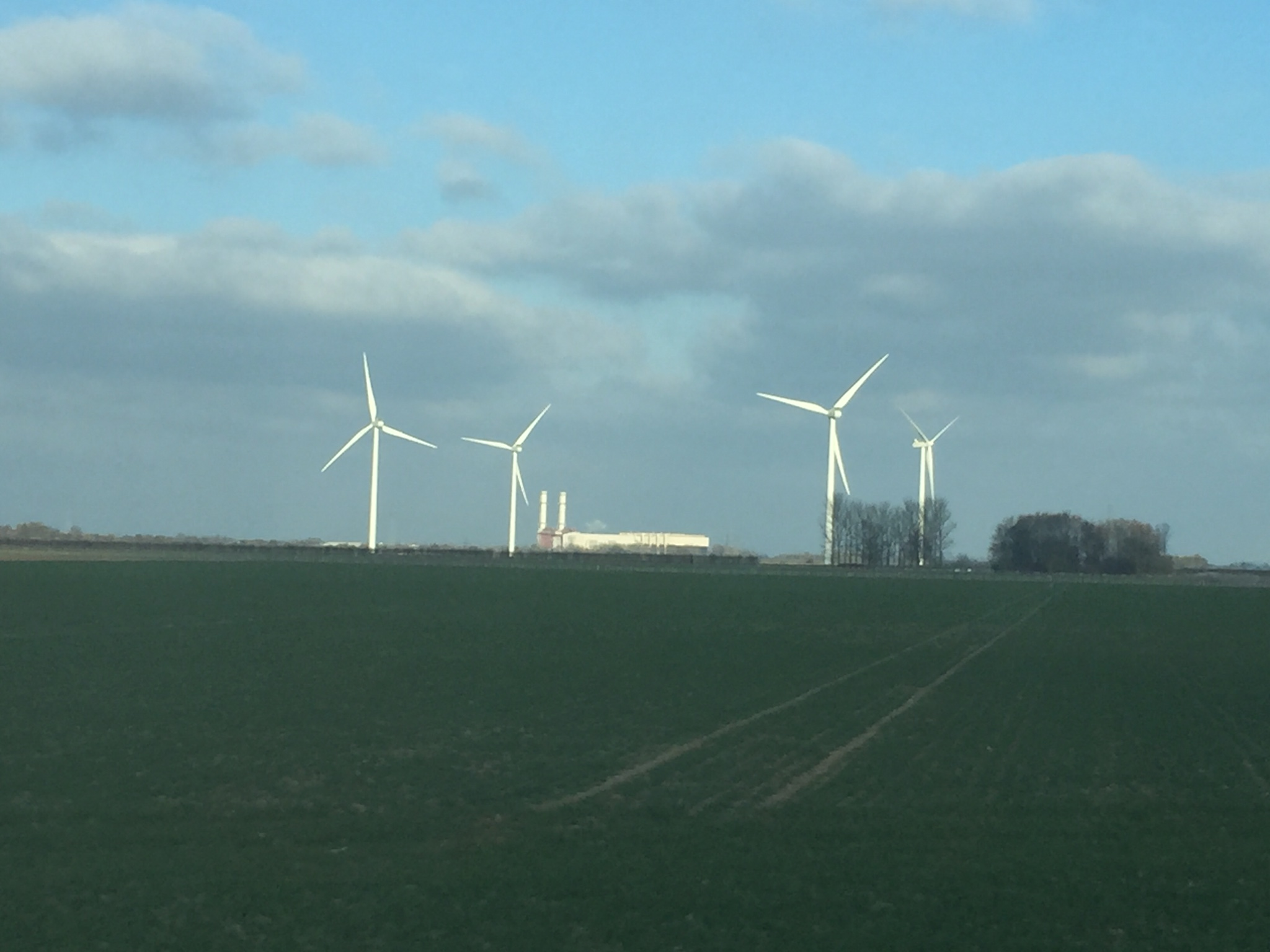 Suton Bridžo elektrinė ir vėjo jėgainės